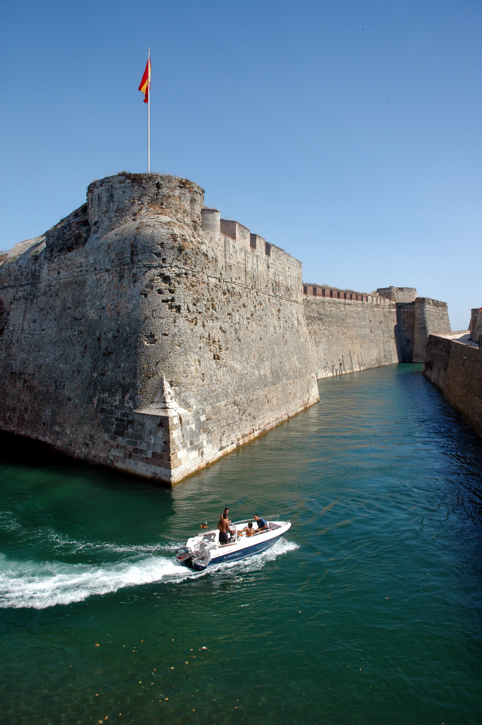 Murallas Reales y Foso de San Felipe. Ceuta, España.